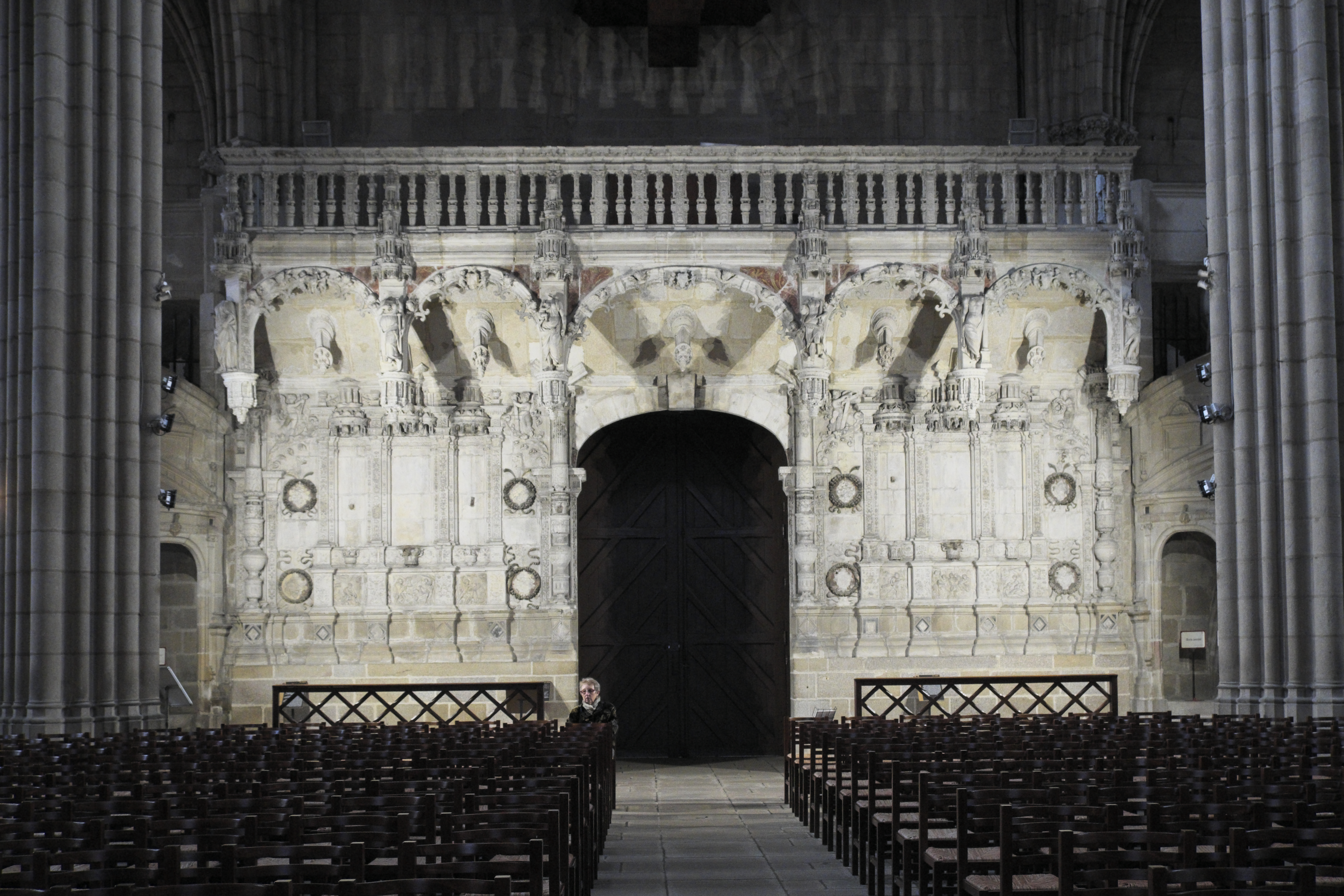 Kathedrale Saint-Étienne in Limoges im Département Haute-Vienne (Nouvelle-Aquitaine/Frankreich), Lettner